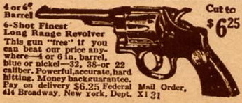 1926 US advertisement for revolver.